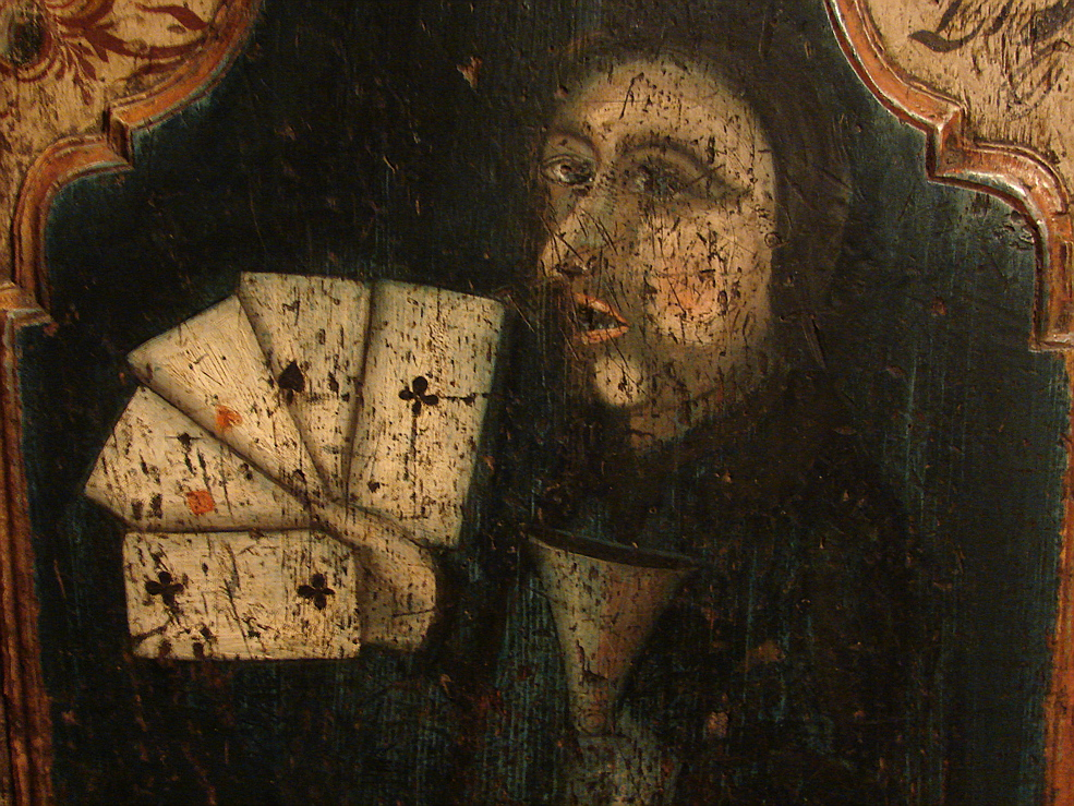 Detalje af kortspiller fra dør på Søndre Brekke Gård Museum, Skien, Telemark